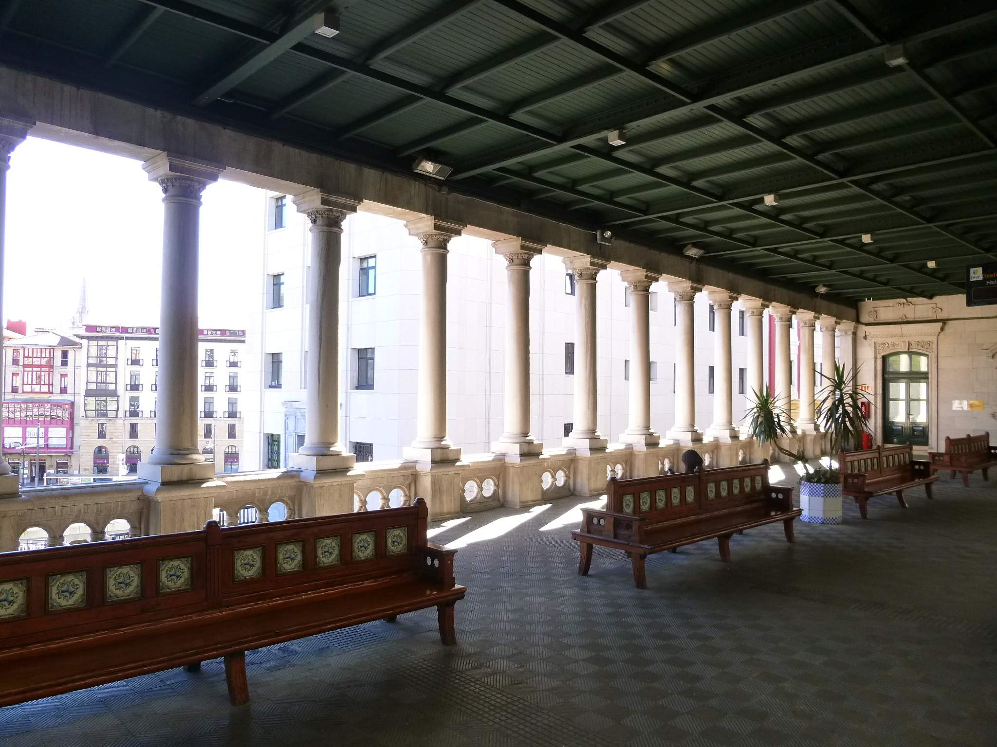 Estacion de FEVE Concordia, en Bilbao